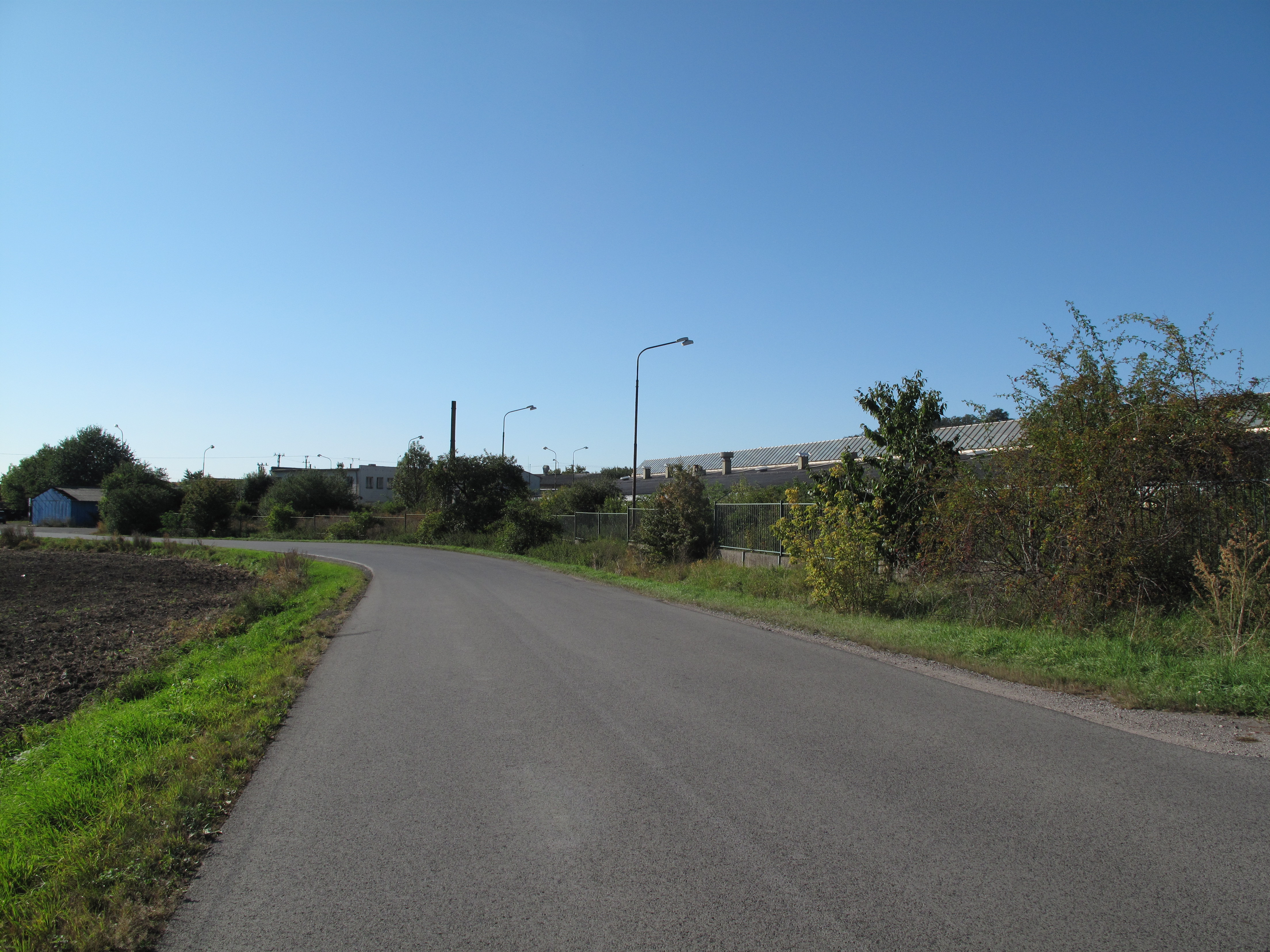 Červený Lhota